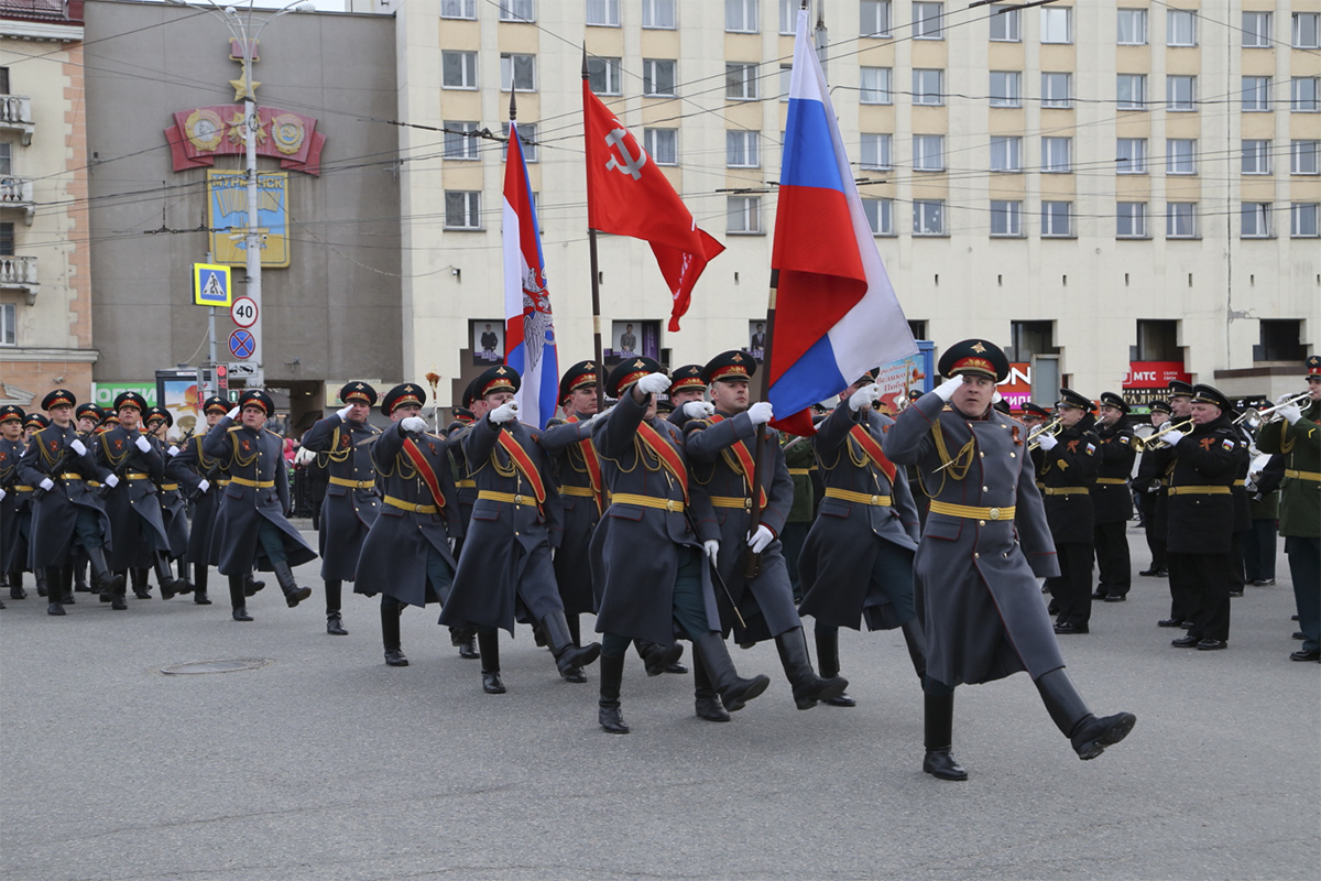 Предгенеральные репетиции военных парадов в Мурманске и Североморске.